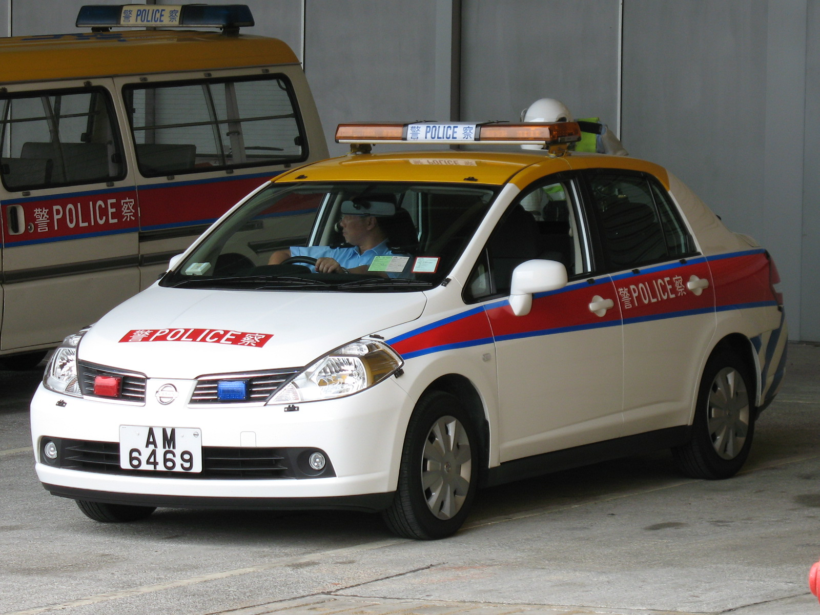 中文（香港）: 一輛機場警區的機場輕型巡邏車，型號是日產Tiida房車，車頂上髹上鮮黃色及配備全黃色LED警燈，方便駛入機場禁區巡邏。